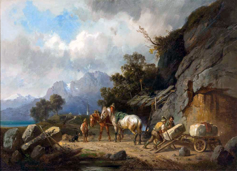 Im Steinbruch. Große Quader werden auf einen Wagen gehievt. Oberbayerischer Gebirgshintergrund, seitlich Blick auf See. Öl/Lwd. 46,5 x 64 cm, sign. und ortsbez. München.